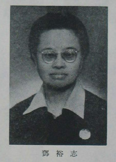 中國人民政治協商會議第一屆全體會議代表